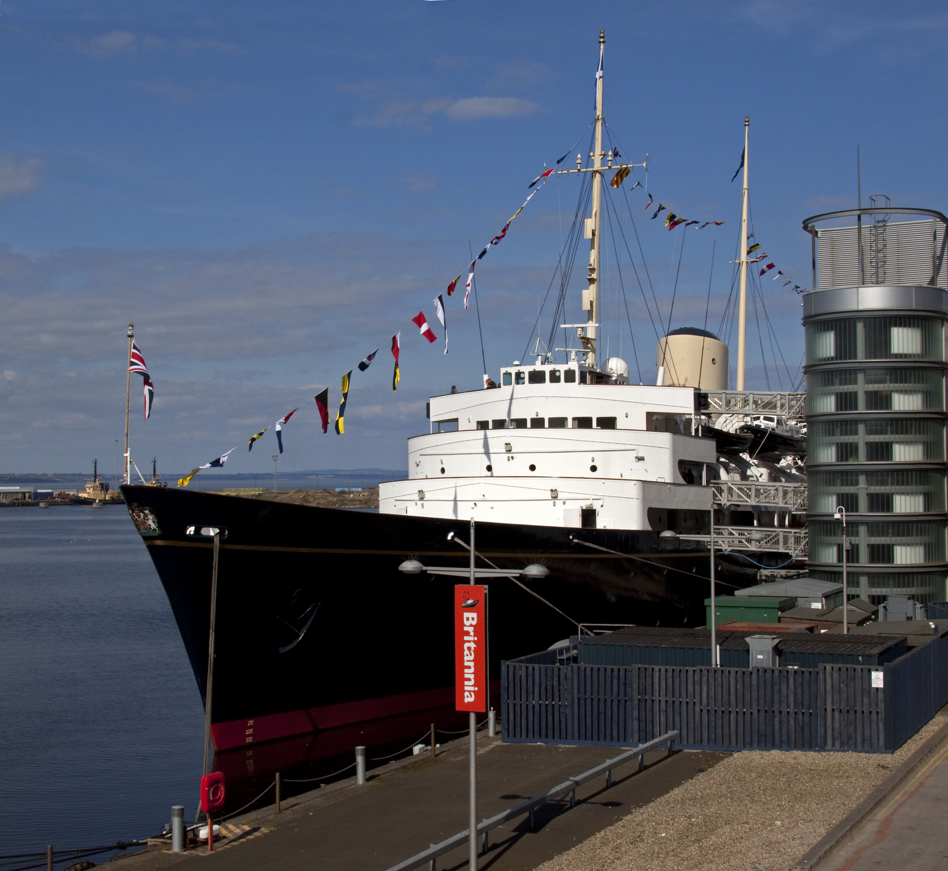 Britannia